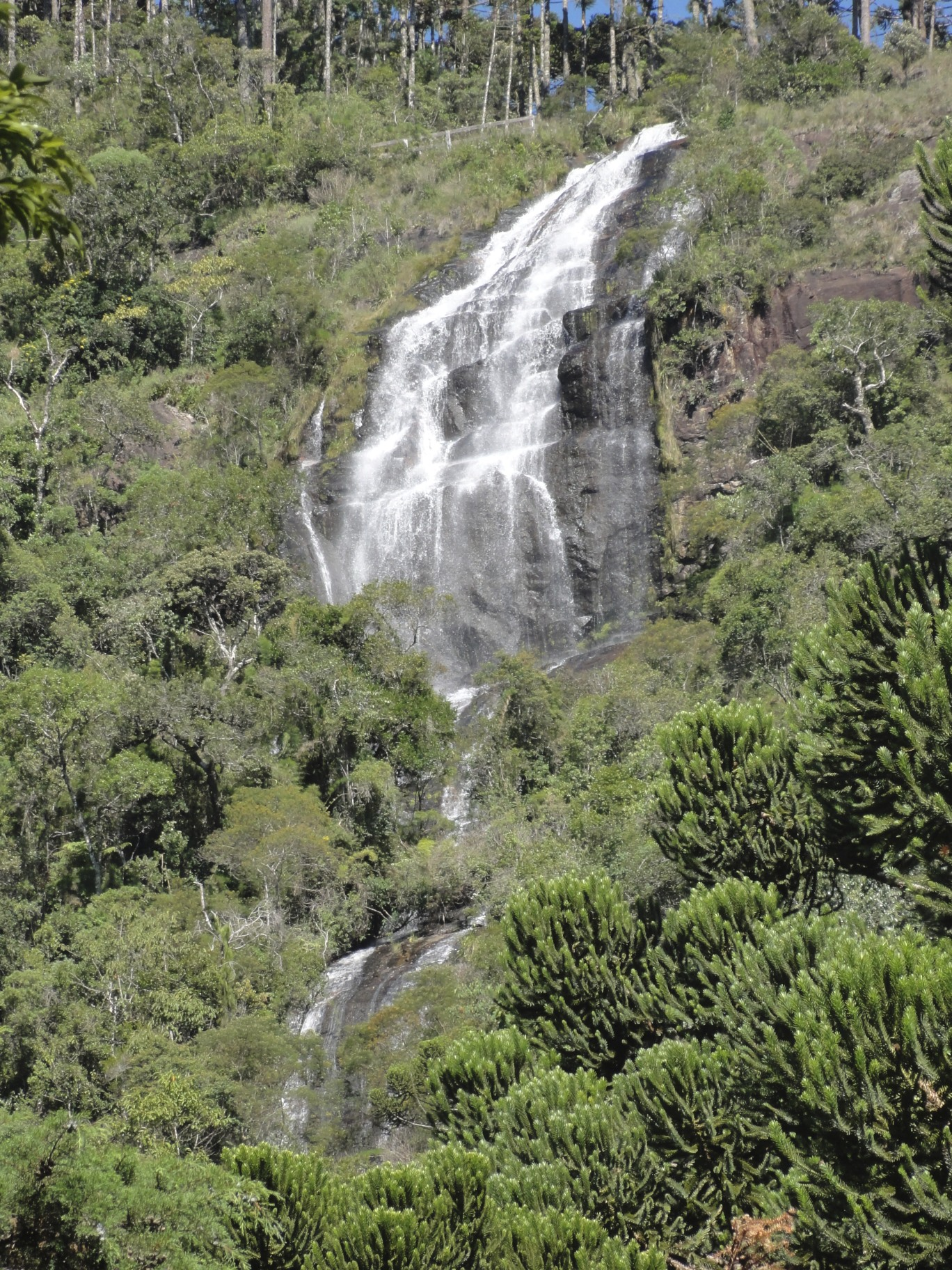 Cachoeira do Toldi